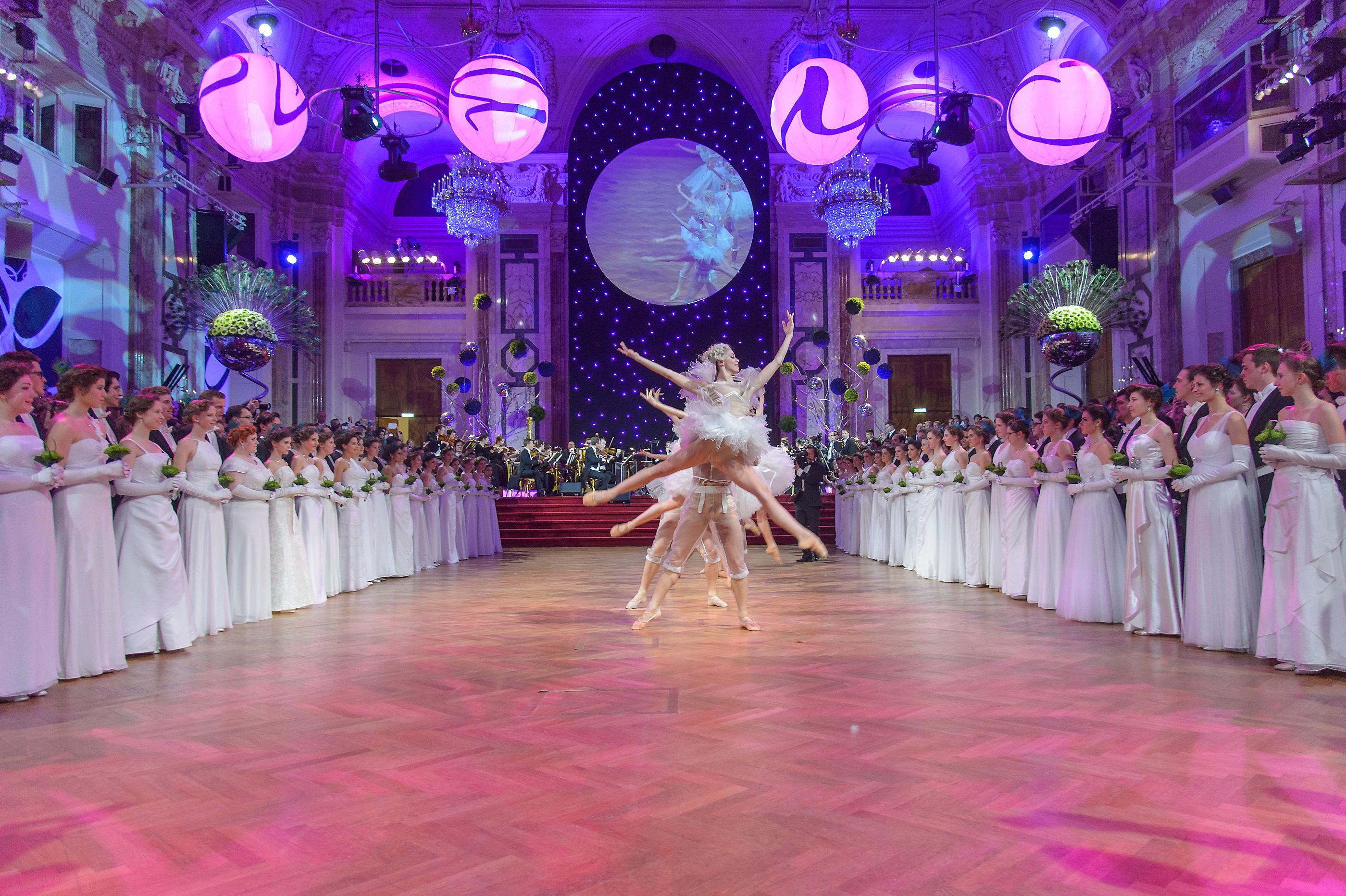 Eröffnung durch das Wiener Staatsopernballett